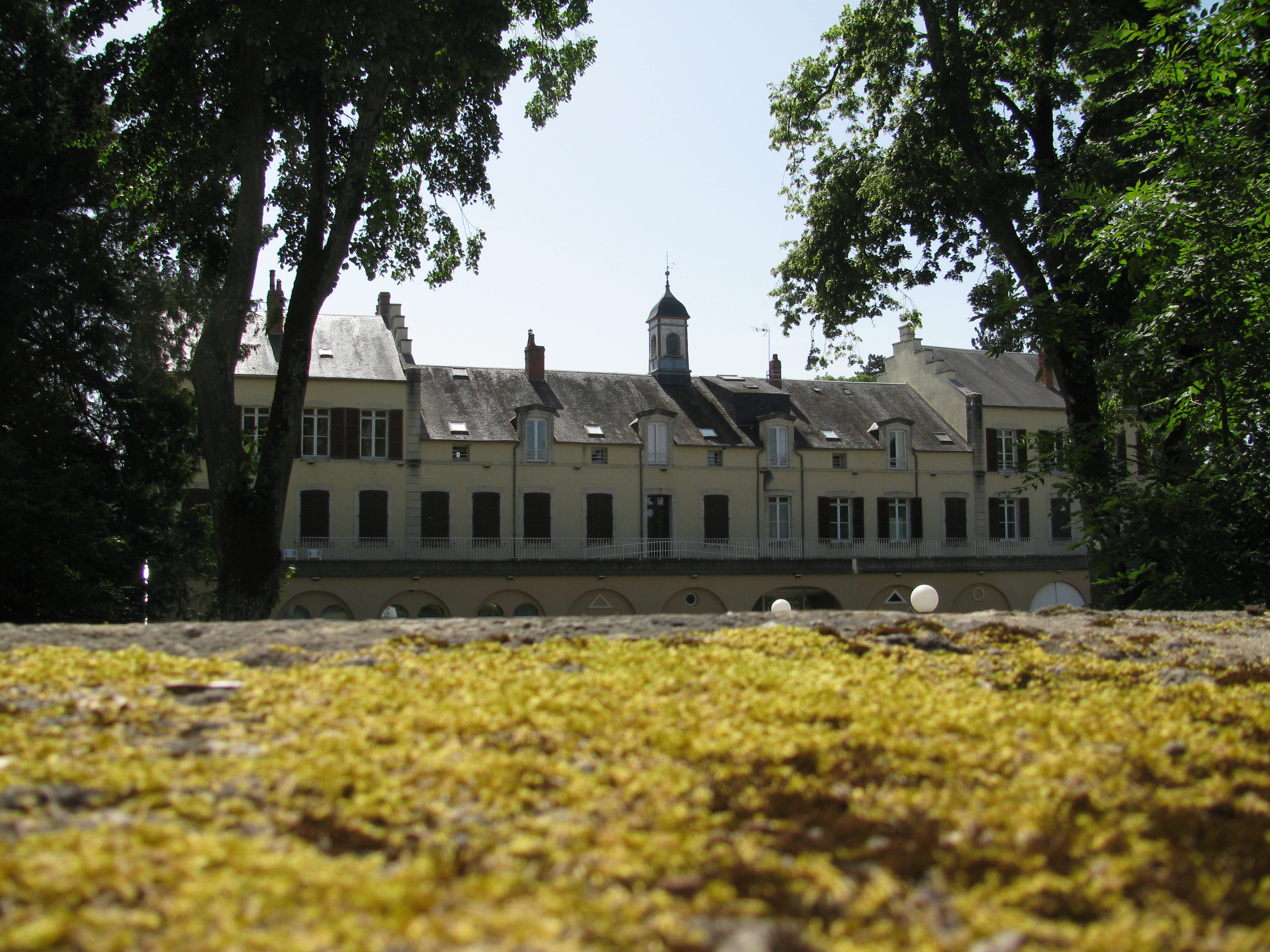 Ancienne abbaye de Réconfort, puis Château de Réconfort, aujourd'hui, Centre de convalescence de Réconfort.